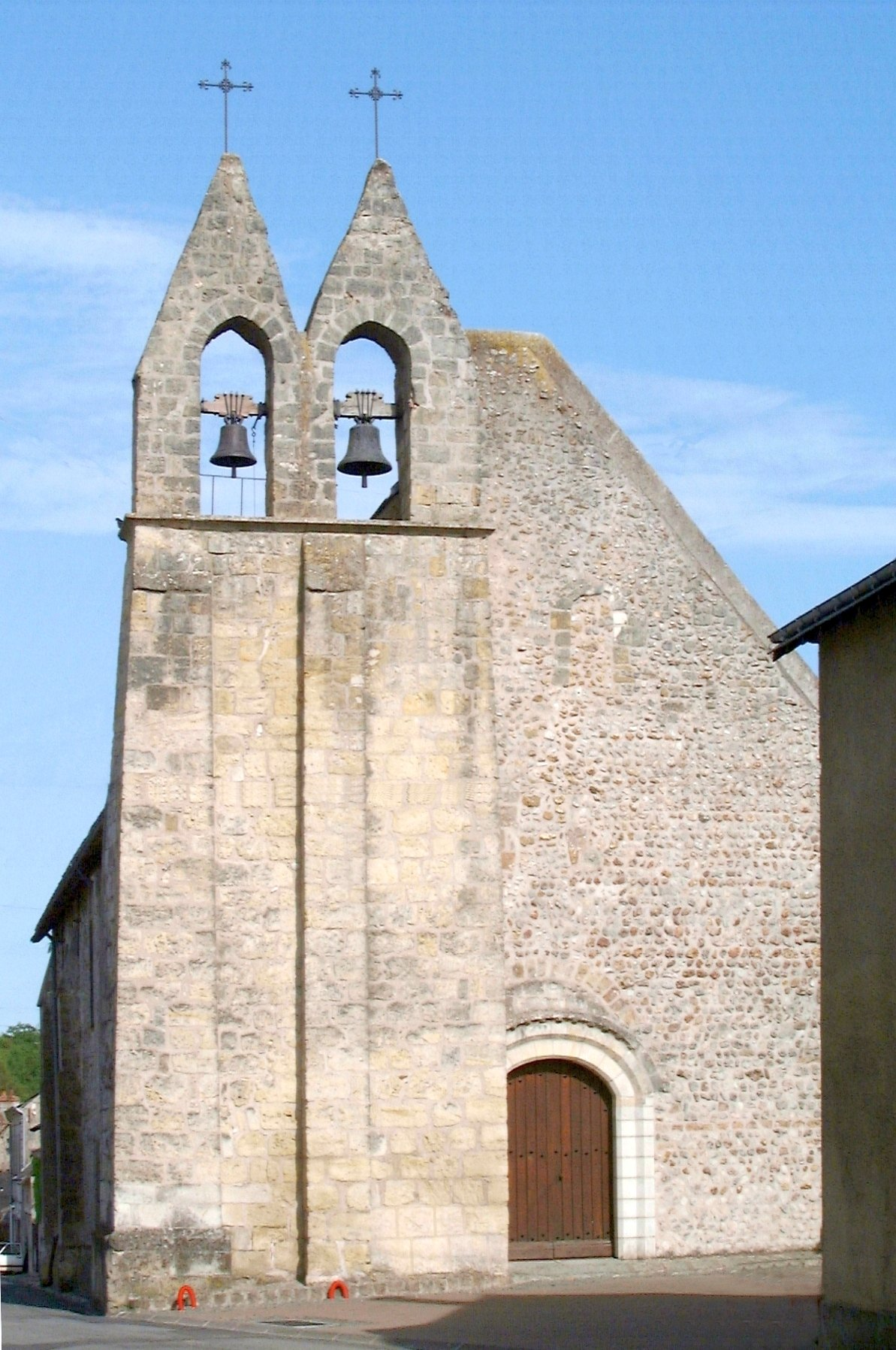 Clocher-pignon double de l'église de Mazières-de-Touraine